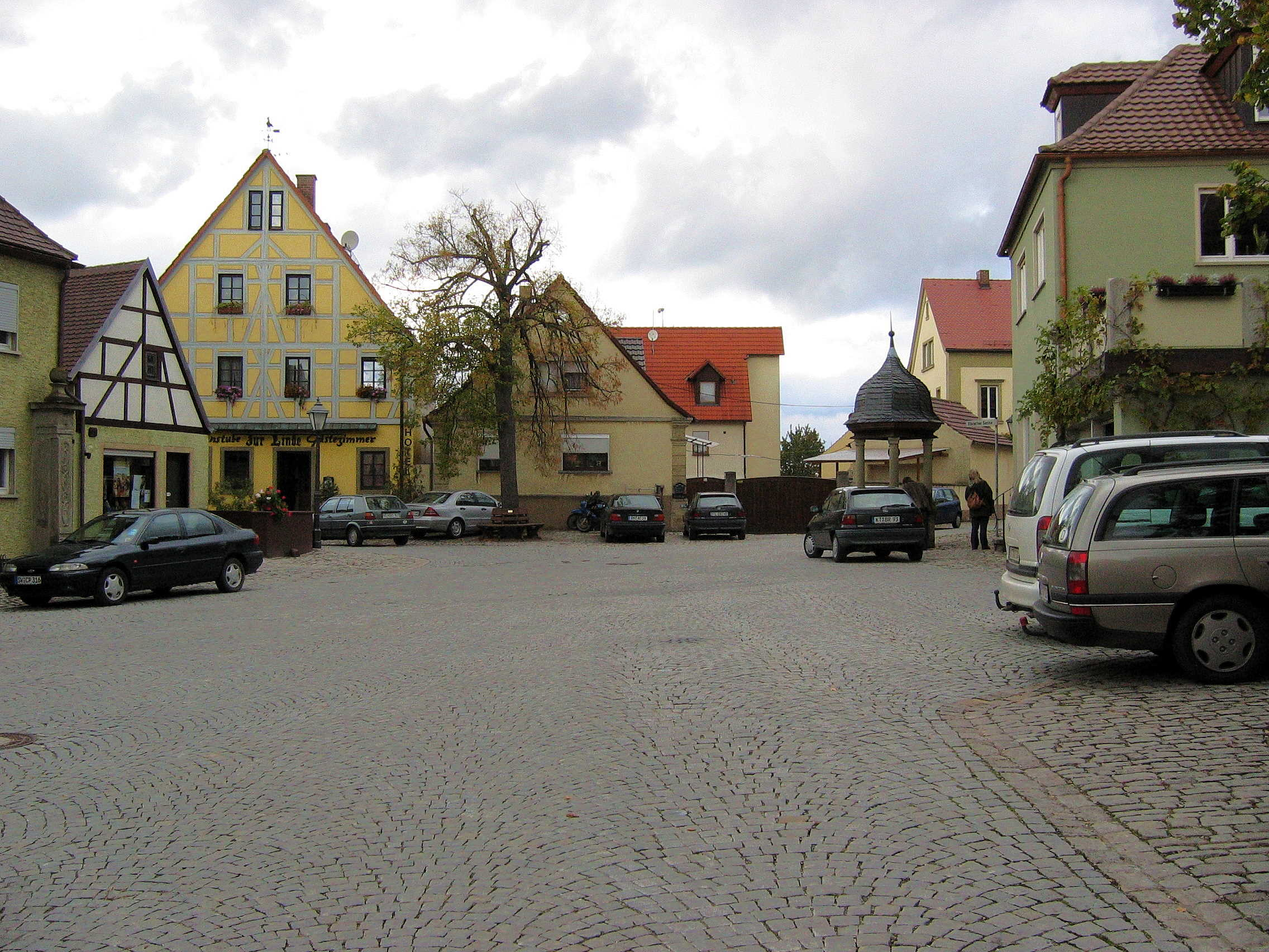 Zentraler Platz in Abtswind